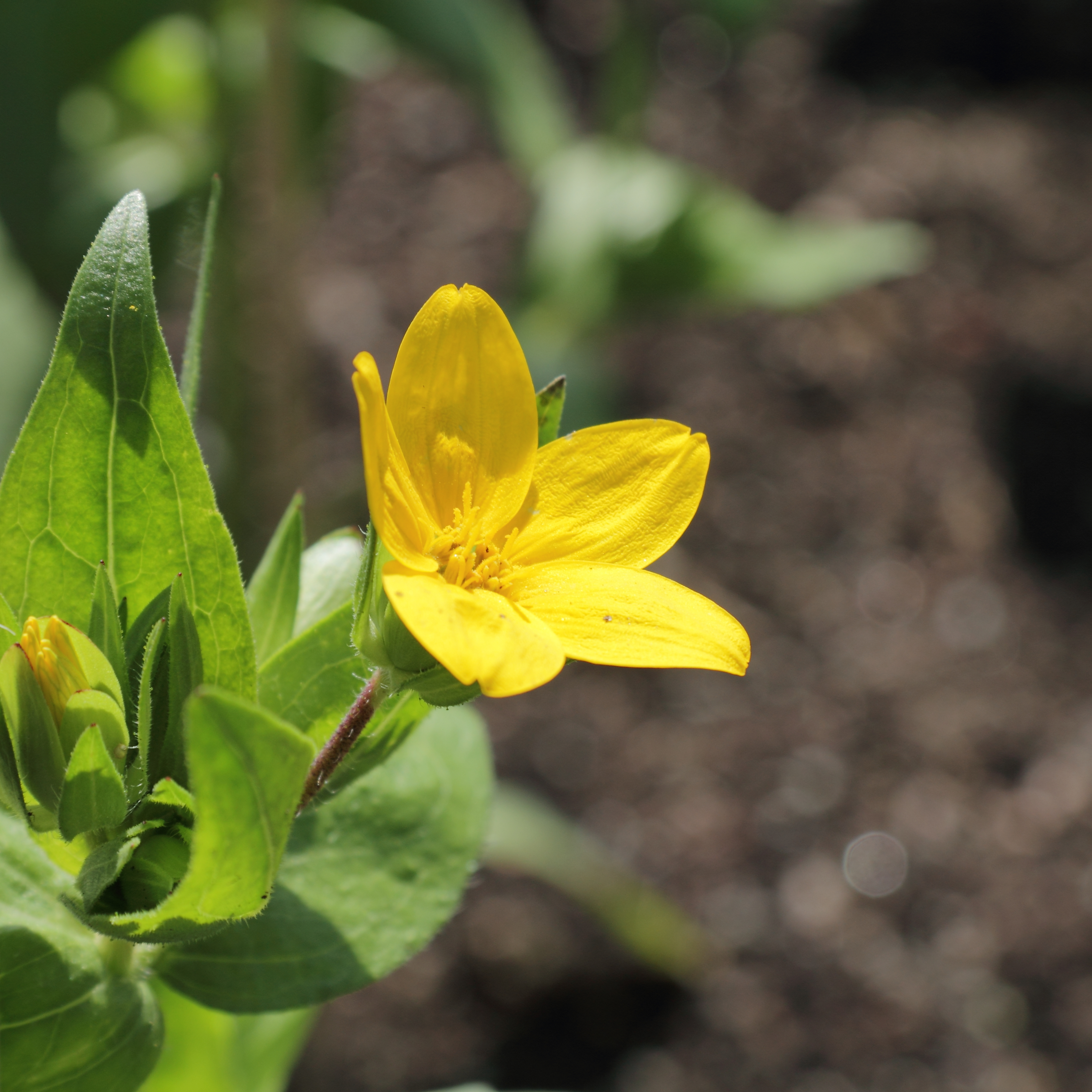 Lindheimera texana, identifierad med hjälp av befintlig skylt vid Bergianska trädgården.